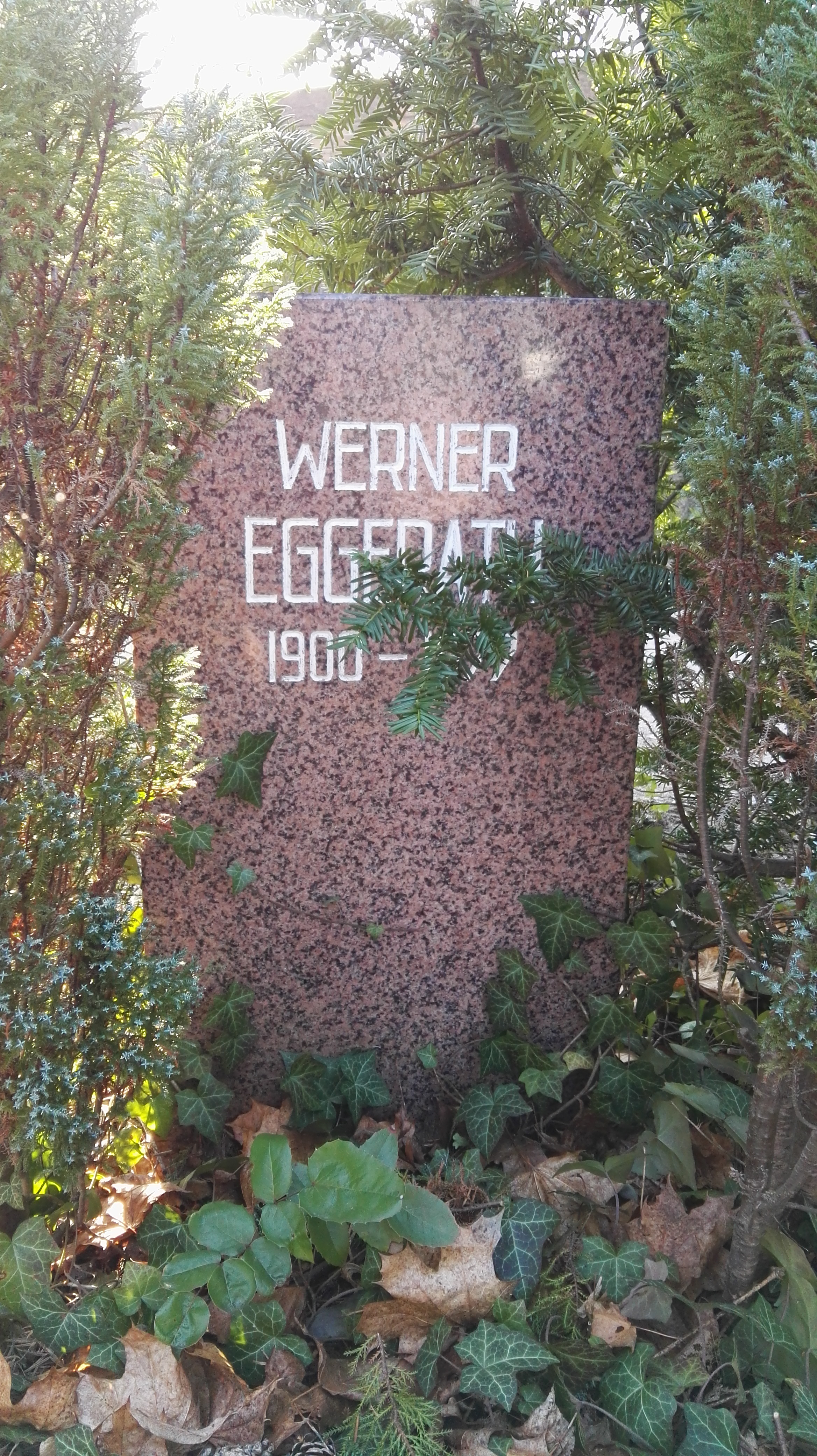 Grab von Werner Eggerath in der Grabanlage Pergolenweg auf dem Sozialistenfriedhof des Zentralfriedhofs Friedrichsfelde